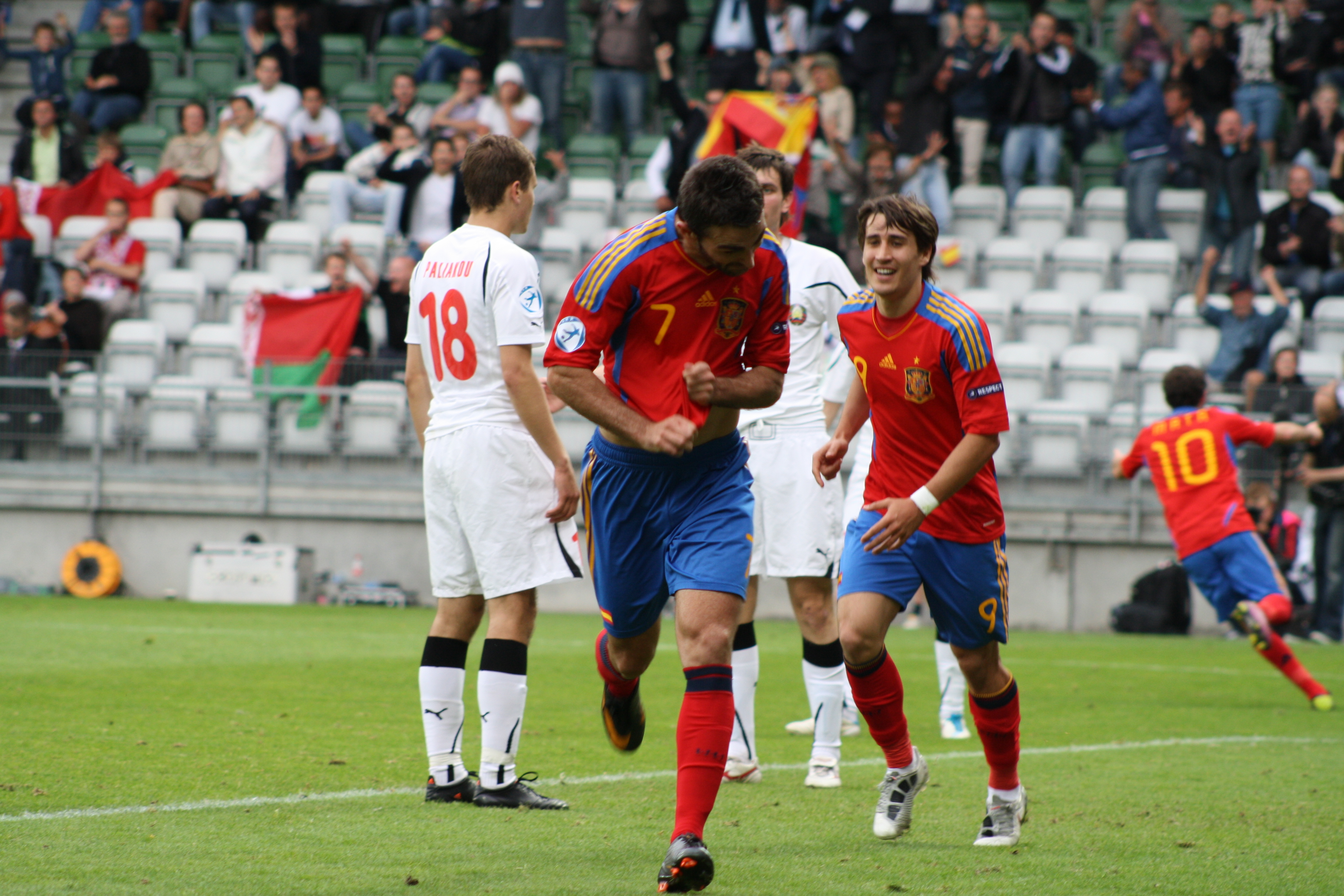 Adrian López and Bojan